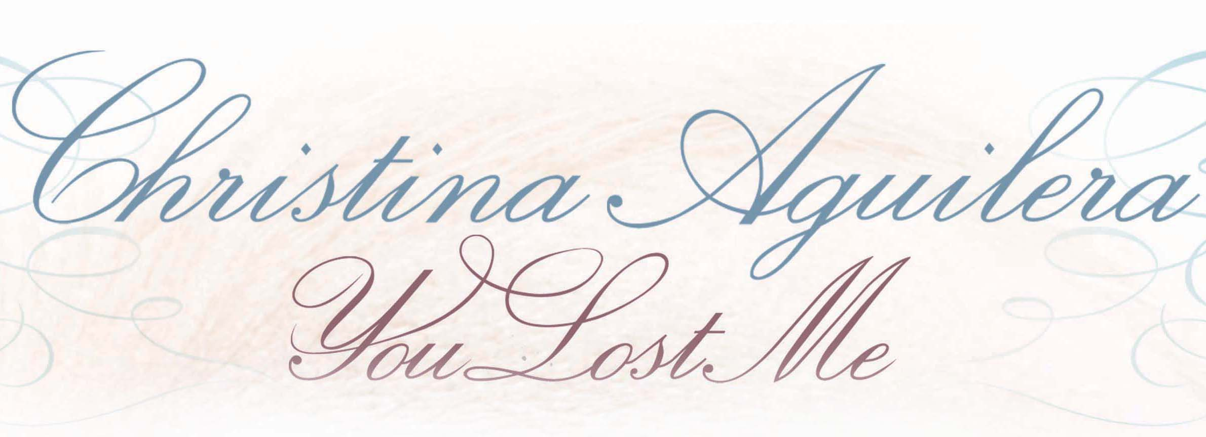 You Lost Me - Cover - Christina Aguilera